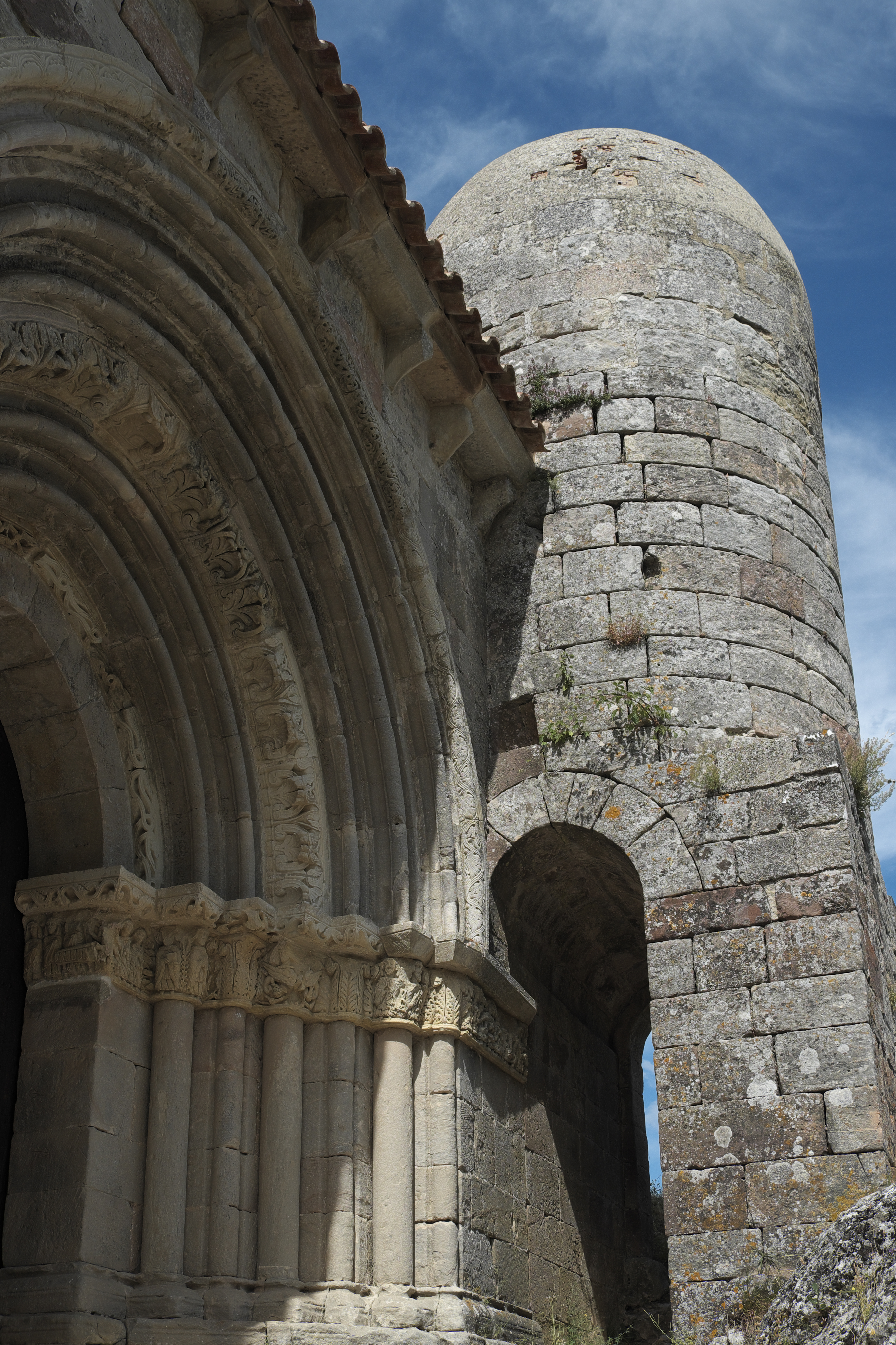 Ermita de Santa Cecilia in Vallespinoso de Aguilar in der Provinz Palencia (Kastilien-León/Spanien), Portal und ehemaliger Wachturm an der Südfassade